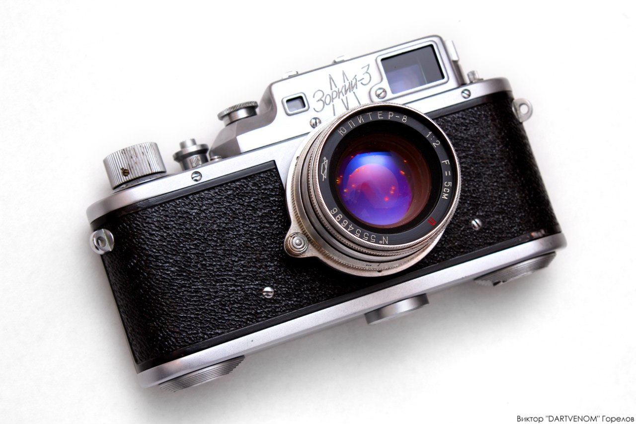 Зоркий-3М